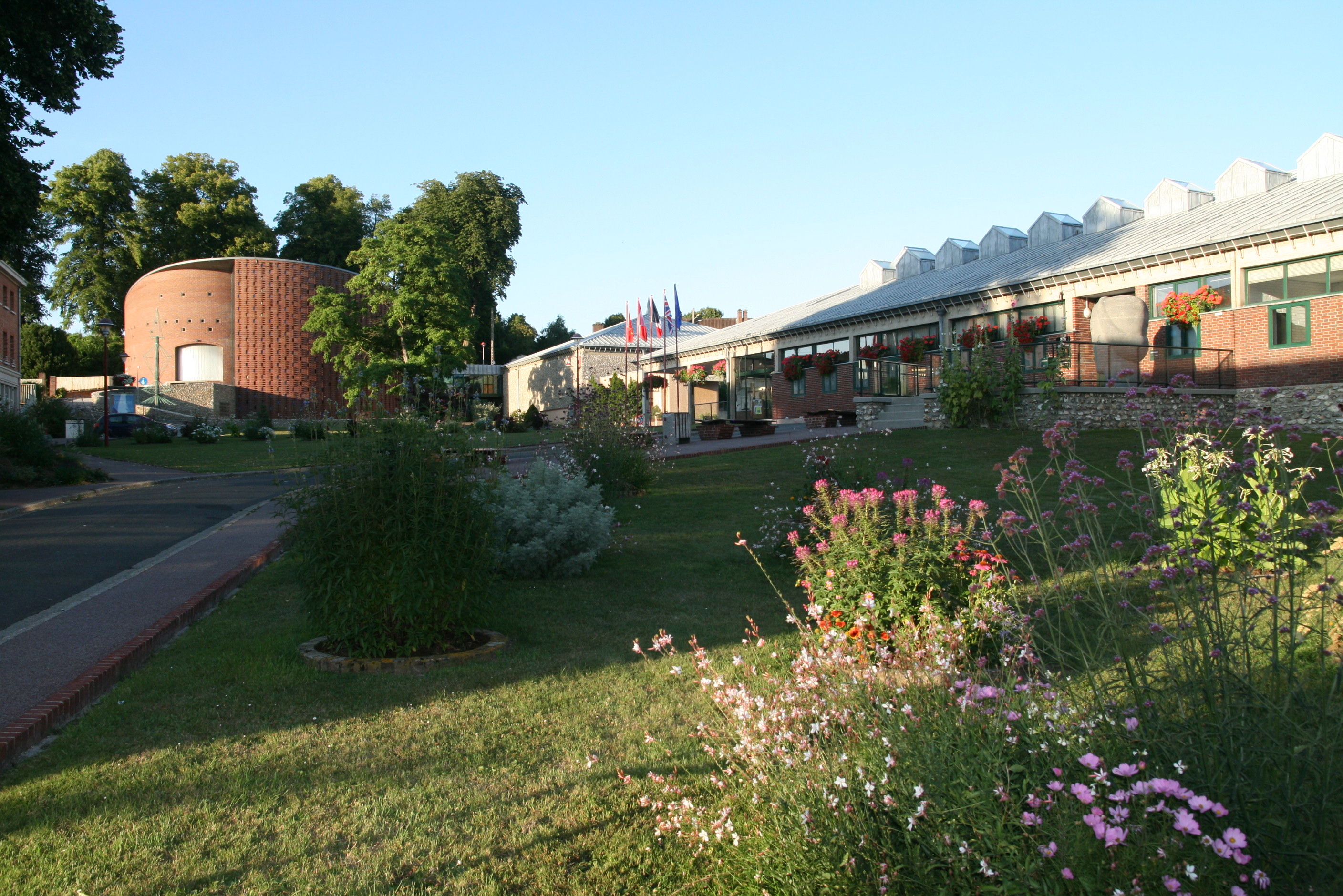 Centre administratif de Neufchâtel-en-Bray, classé au Patrimoine National du XXème siècle